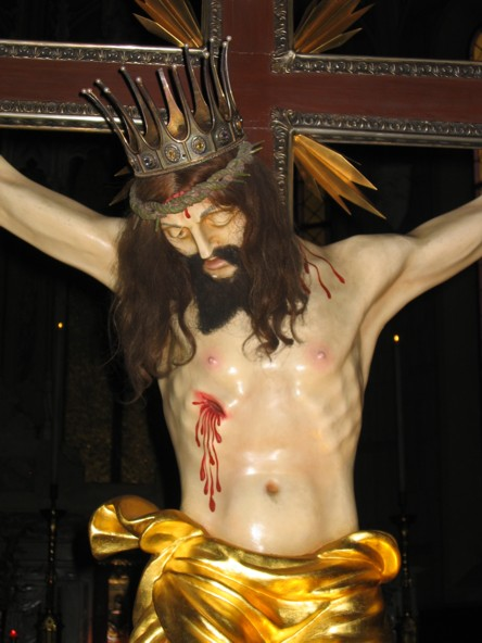 Desio, Santuario del Crocifisso, interno: primo piano del Crocifisso.